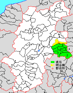 長野県南佐久郡の範囲 緑色が現在の範囲、黄色が明治中期の佐久郡の範囲 現在の佐久市は高瀬以南望月以東の元南佐久郡地域とそれ以外の元北佐久郡地域とに灰色線で分断される